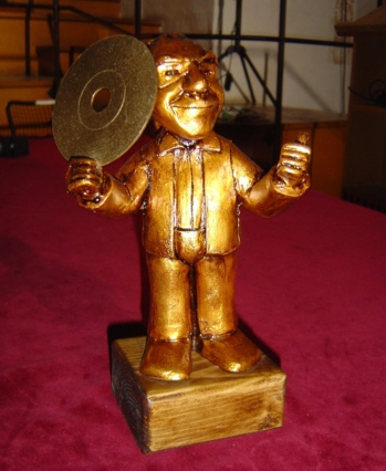 Trofeo GoldSpirit correspondiente a la IV Edición de los Premios GoldSpirit (celebrada como parte del I Congreso Internacional de Música de Cine 'Ciudad de Úbeda'. Escultura por Teresa Gil. Foto por Heriberto Navarro.